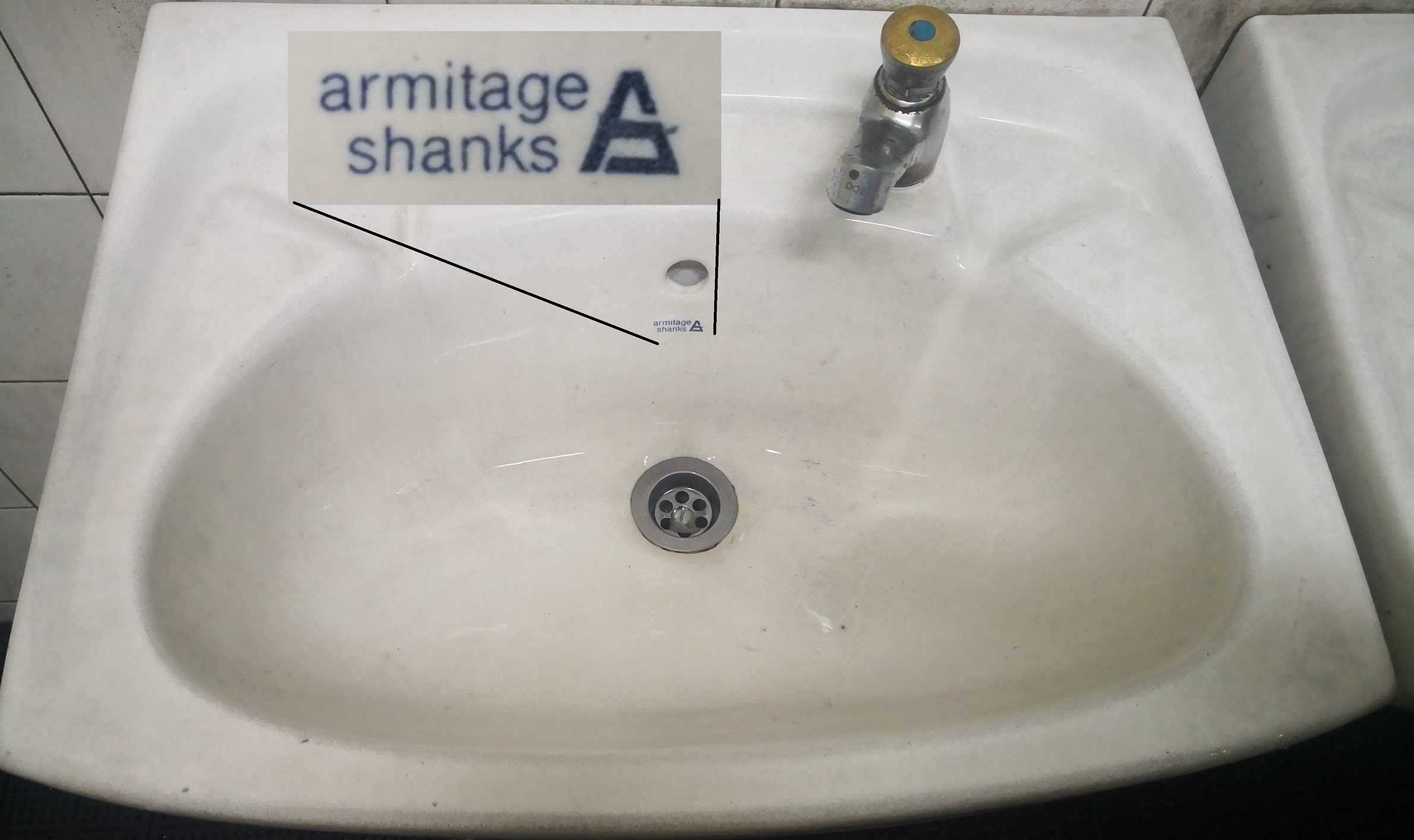 Besen (Dipercayai berasal 90'an) yang mempunyai Armitage Shanks logo